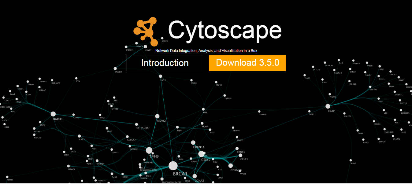 Cytoscape home page